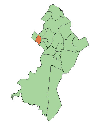 Ubicación de Villa Elisa.